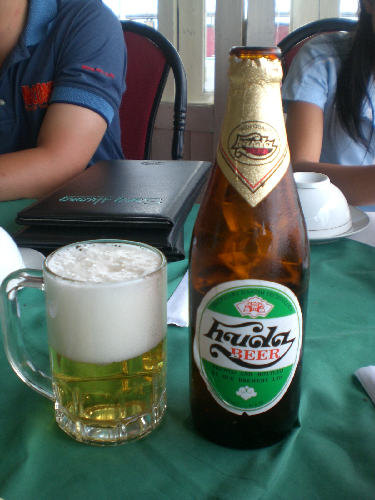 Huda from Danang,Vietnam